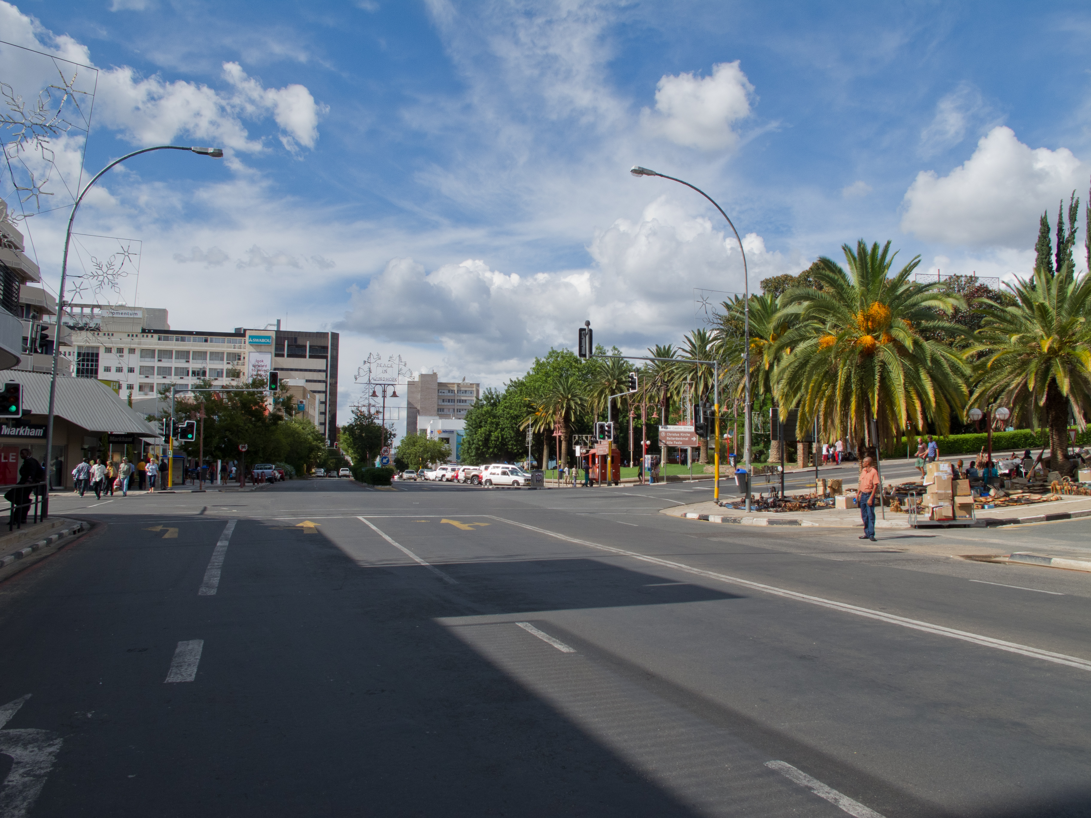 Windhoek